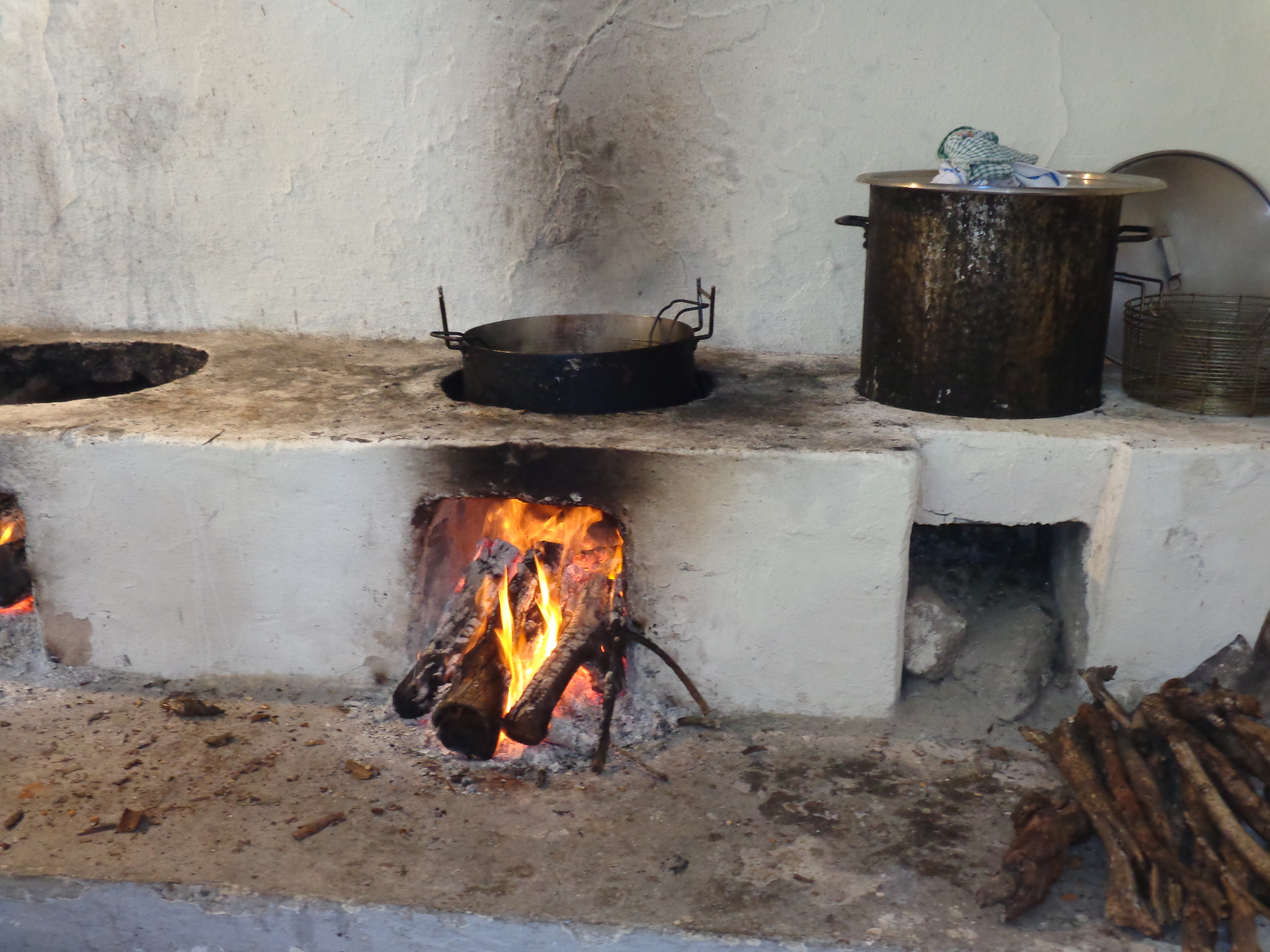 Inselfest im Kloster Panagia Kira auf Nisyros/Südägäis